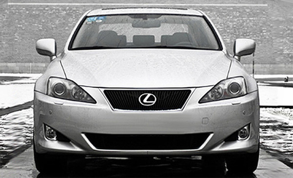 雷克萨斯IS300 * 初雪